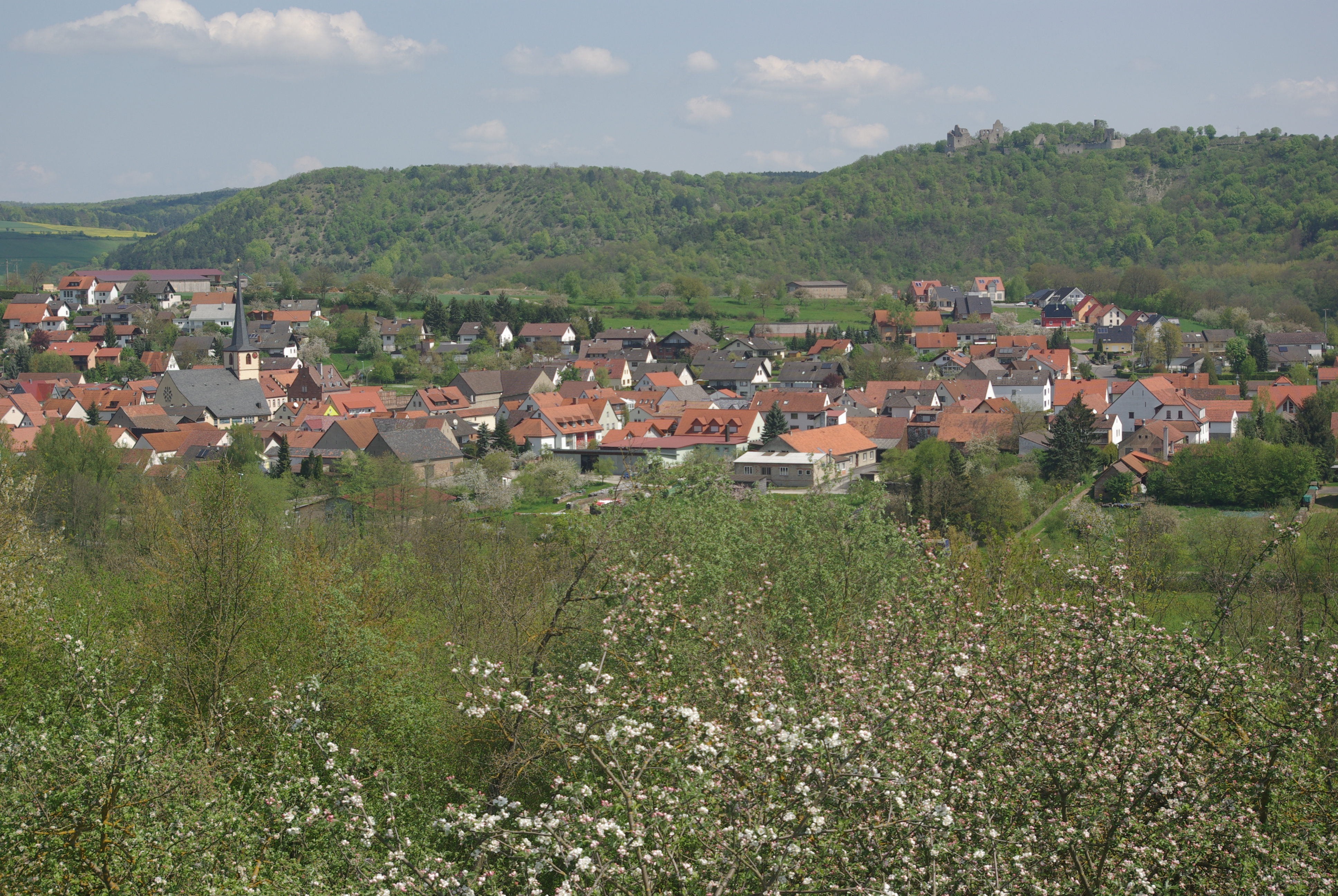 Gössenheim (Altort) von Westen